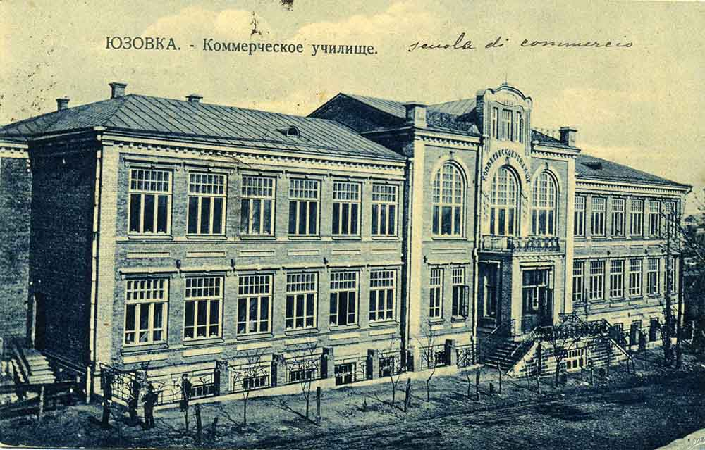 Открытка издательства Якова Переха. Коммерческое училище